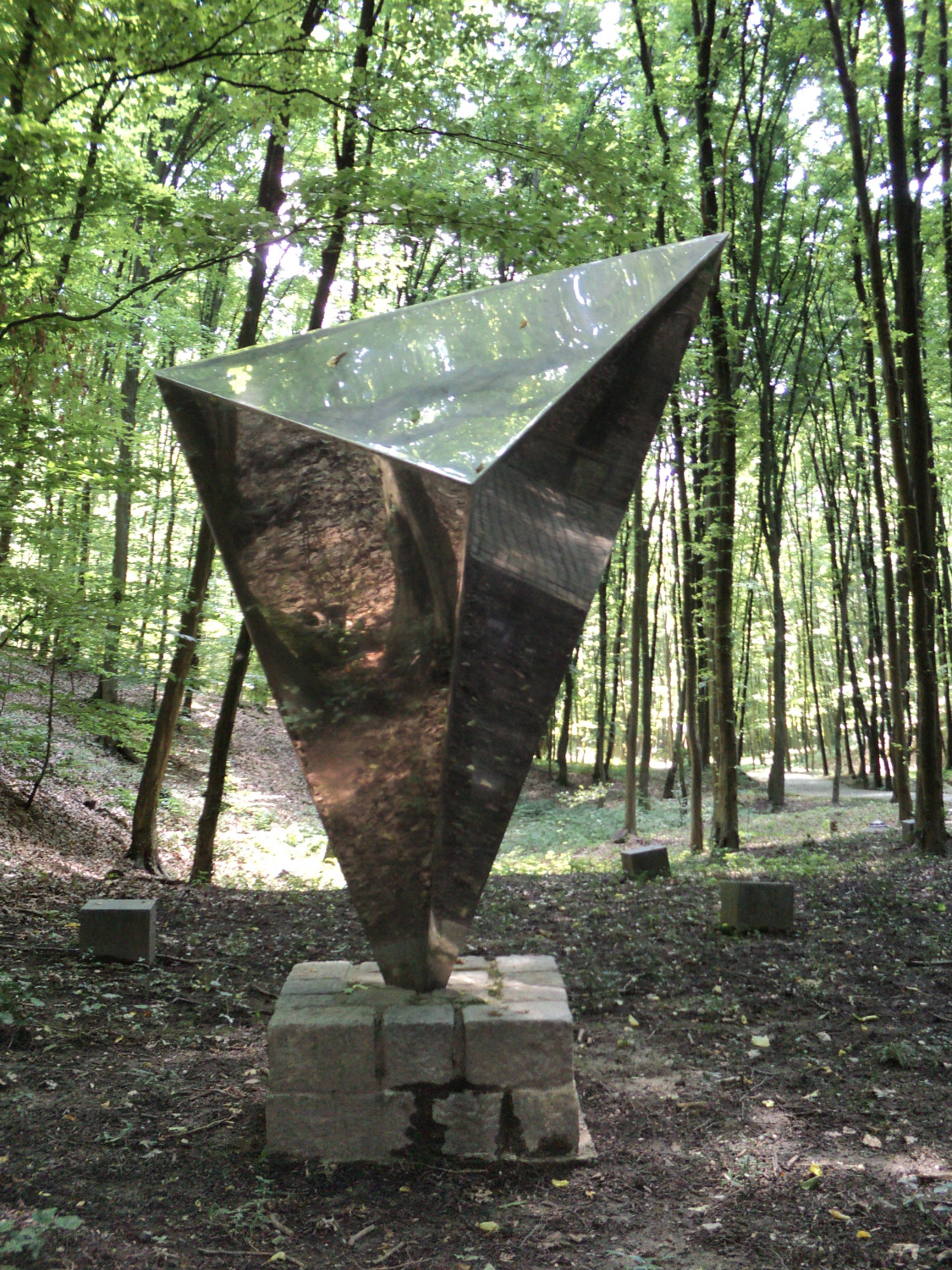 Skulptura u Dotršćini, autor: Vojin Bakić. Self-made. Jun 2011.